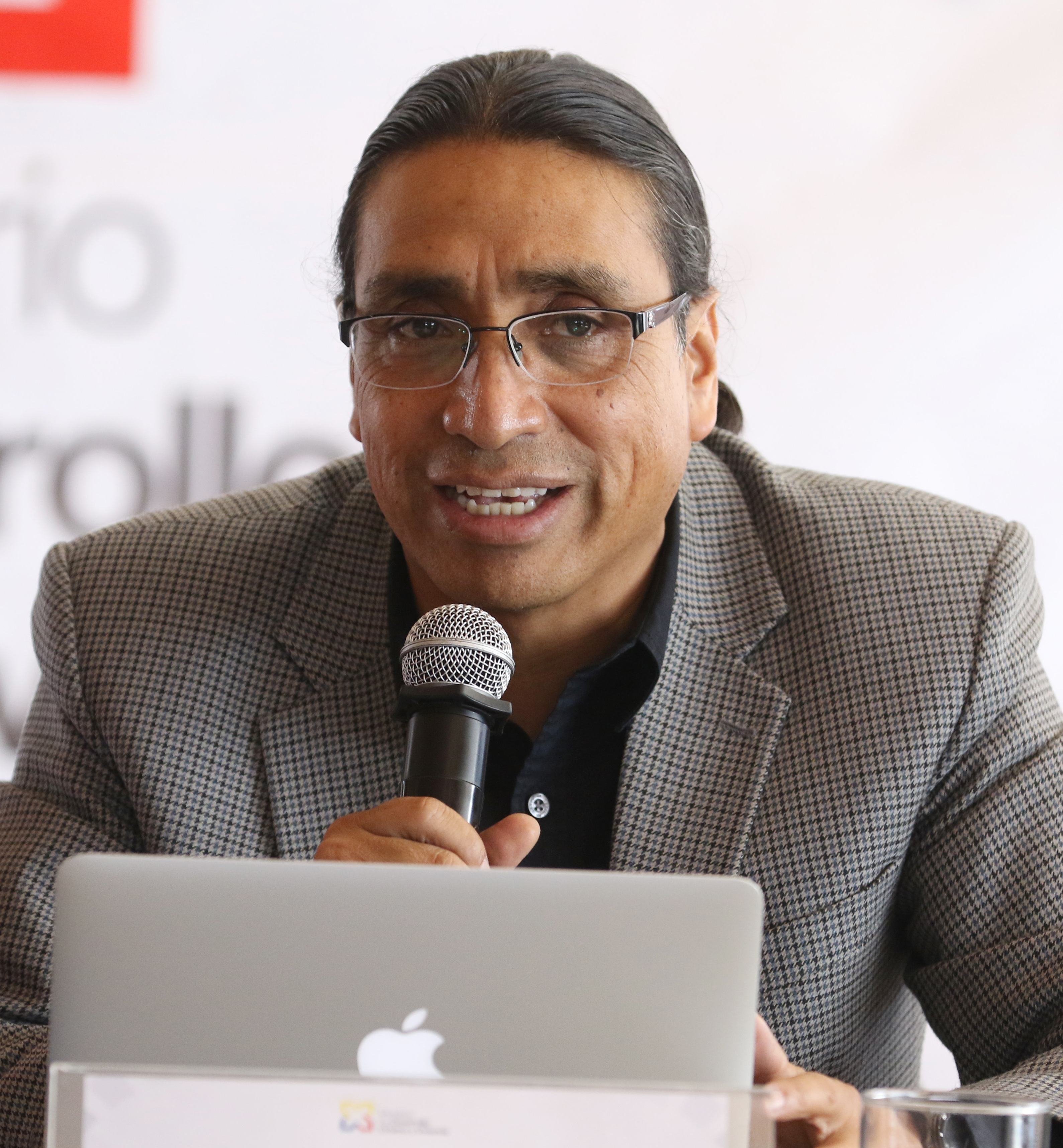 MISIÓN CASA PARA TODOS Quito, 30 de junio de 2017 (Andes).- En el Ministerio de Desarrollo Urbano y Vivienda se llevó a cabo la presentación del Proyecto Misión Casa Para Todos impulsado por el Presidente de la República Lenín Moreno. En el acto estuvieron presentes de izq. a der. María Alejandra Vicuña, Ministra de Desarrollo Urbano y Vivienda; Virgilio Hernández, Consejero Presidencial para Política de Hábitat y Ambiente y Gustavo Baroja, Prefecto de Pichincha. ANDES/Micaela Ayala V.